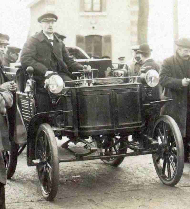 [Collection Jules Beau. Photographie sportive] : T. 8. Années 1898 et 1899 / Jules Beau : F. 20. Course de côte, Chanteloup, 27 novembre 1898